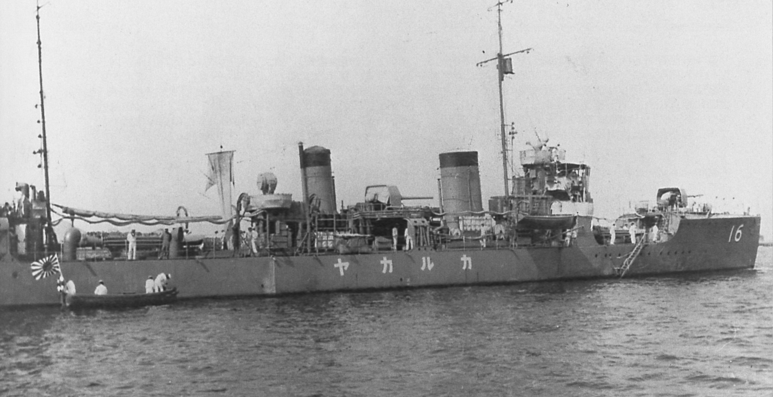 昭和5年12月～昭和8年11月にかけて米軍が撮影した、中国水域における「刈萱」。接舷中の小艇は6メートル内火艇。